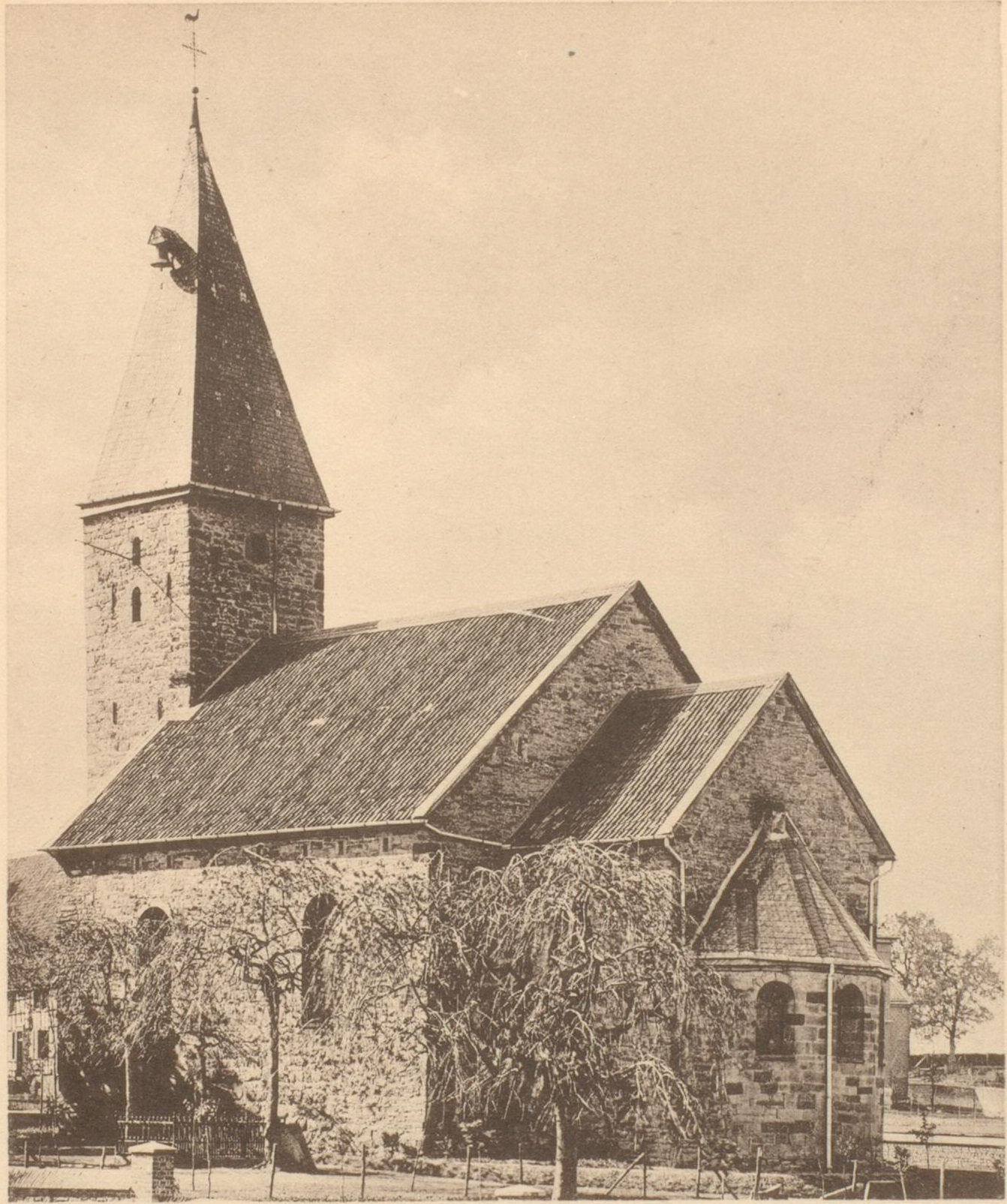 Die Alte Kirche in Eichlinghofen von der Süd-Ostseite um 1893